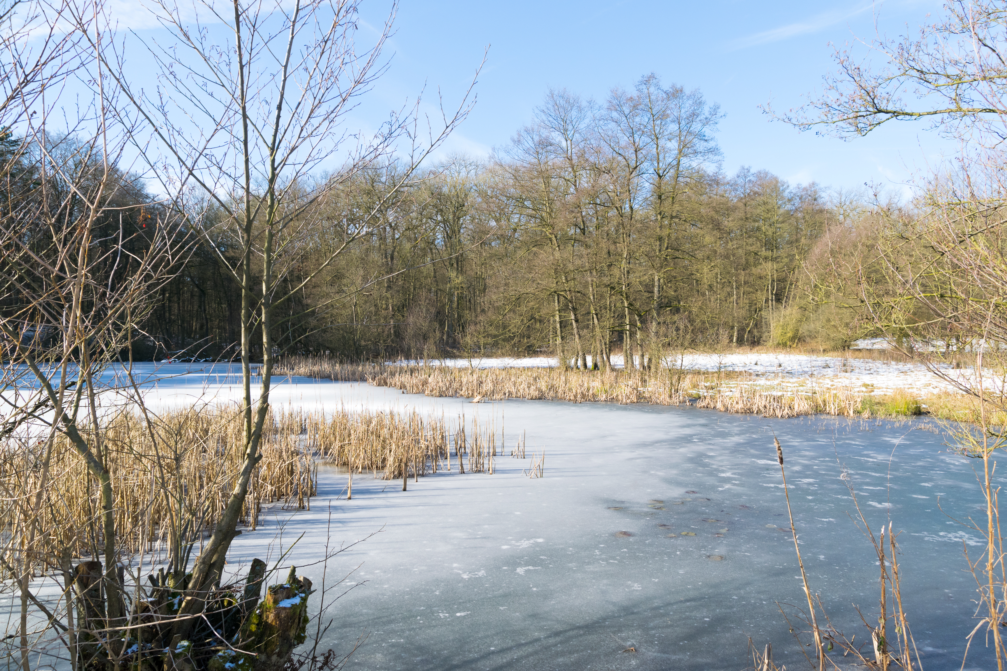 Naturschutzgebiet Beller Holz; zugefrorener Ellernteich